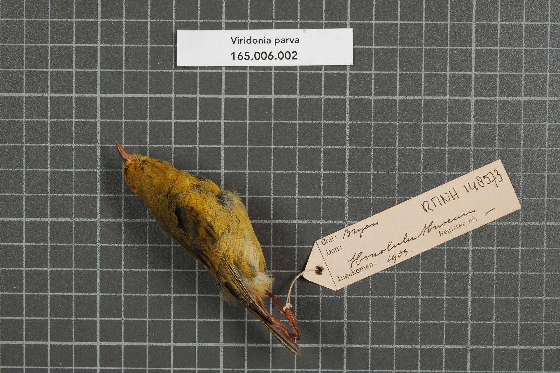 Viridonia parva (Stejneger, 1887)